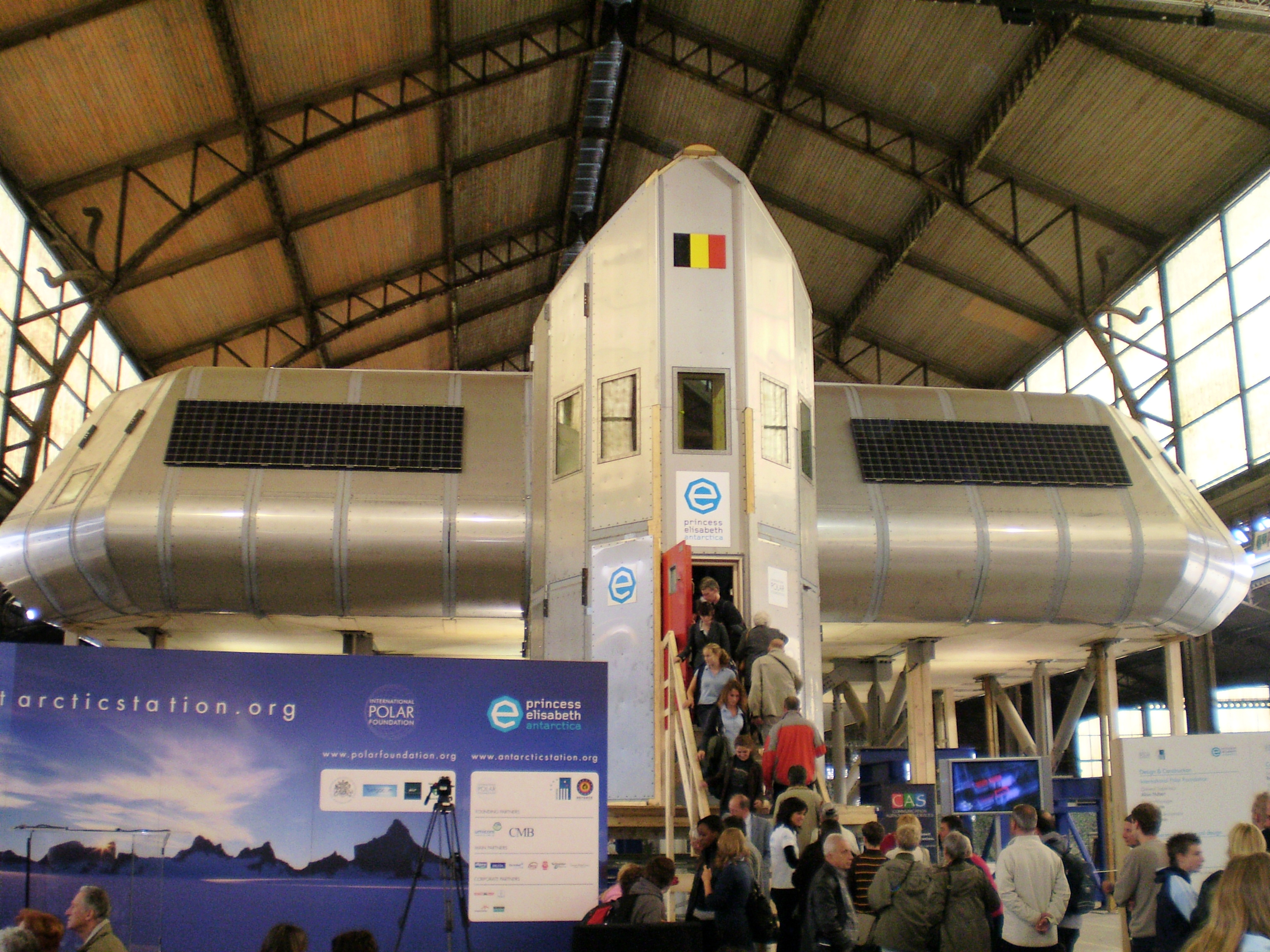 Base antarctique Princesse Elisabeth, prémontée et présentée au public le lendemain de son inauguration - ancienne gare maritime de Tour et Taxis, à Bruxelles